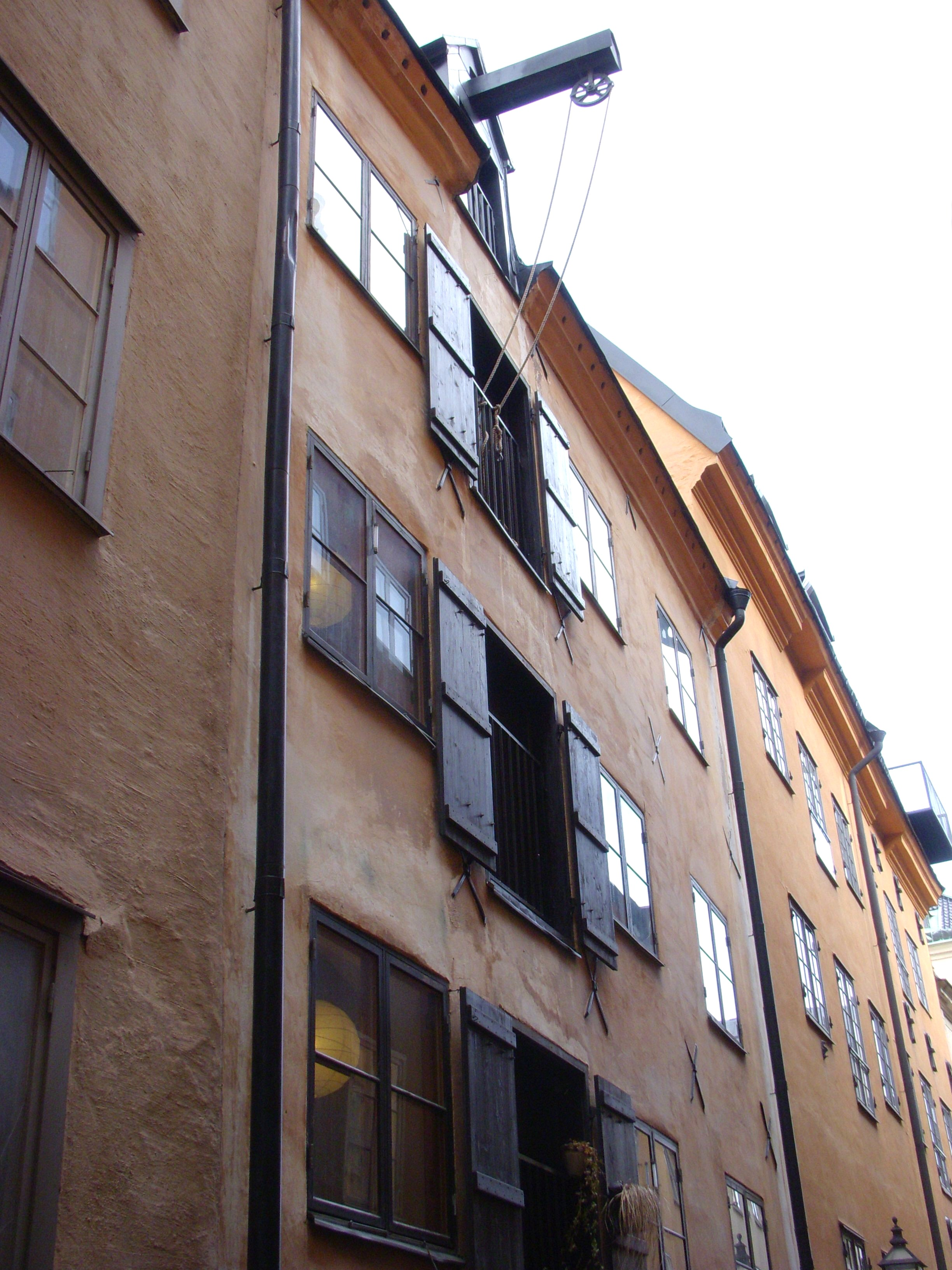 Skottgränd i kv Bacchus, Gamla stan